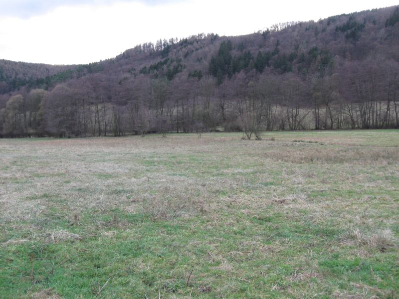 Rakovecké údolí - místo, kde ve středověku stávala ves Sokolí